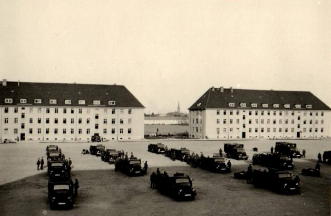 Kompleks białe koszary w 1940